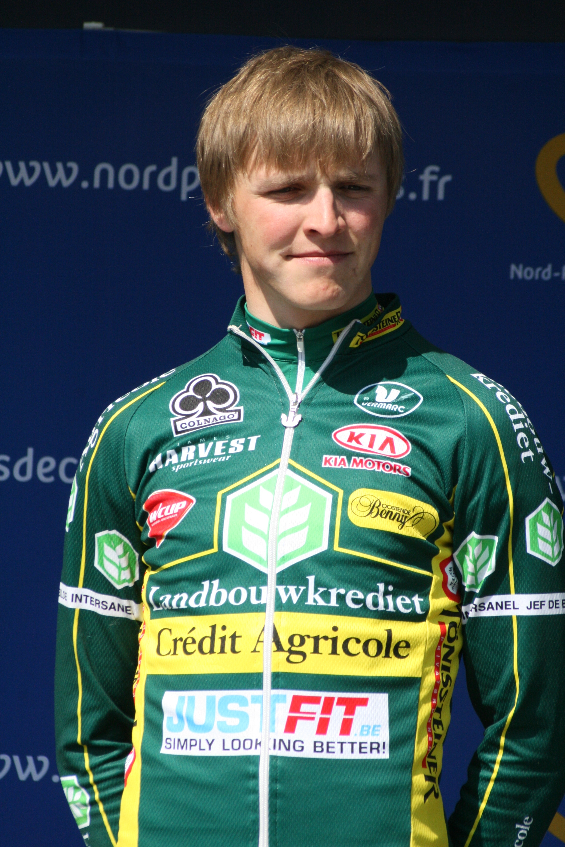 Présentation des coureurs au départ de la première étape Egidijus Juodvalkis